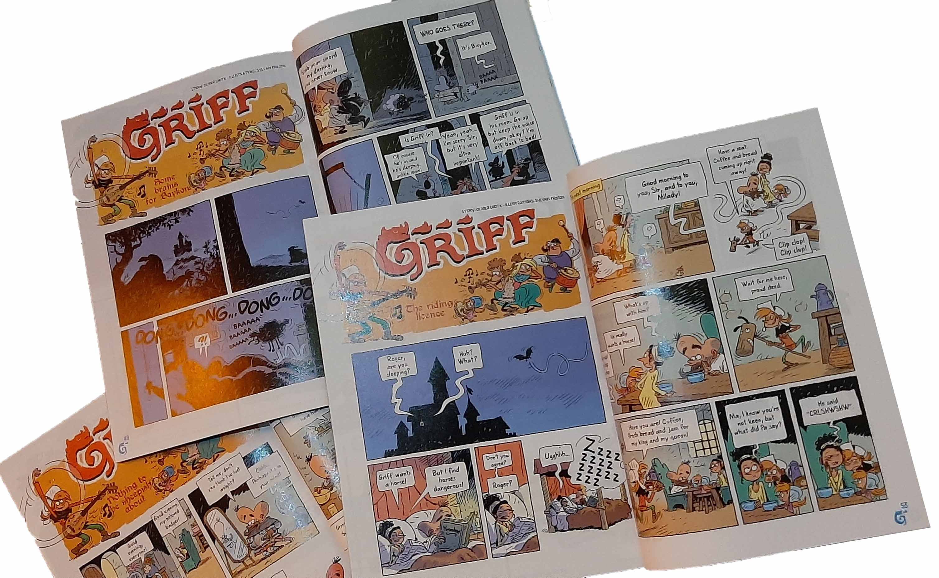 Gibus est une BD éditée par Bayard jeunesse éditions. Créateurs Olivier Lhote et Philippe Dimunsch. Dessinateur Sylvain Frécon.